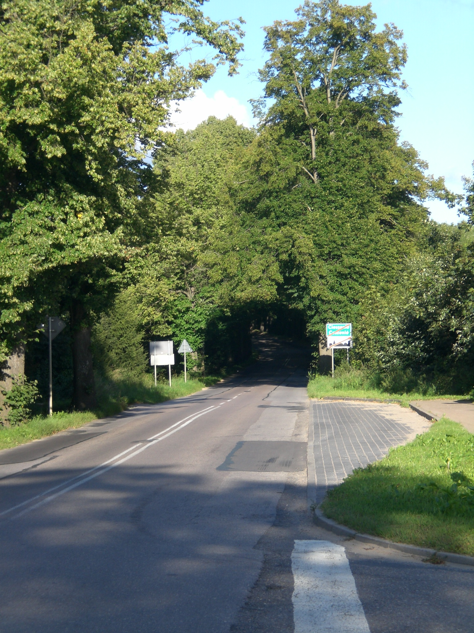 Cieszenie - DW211